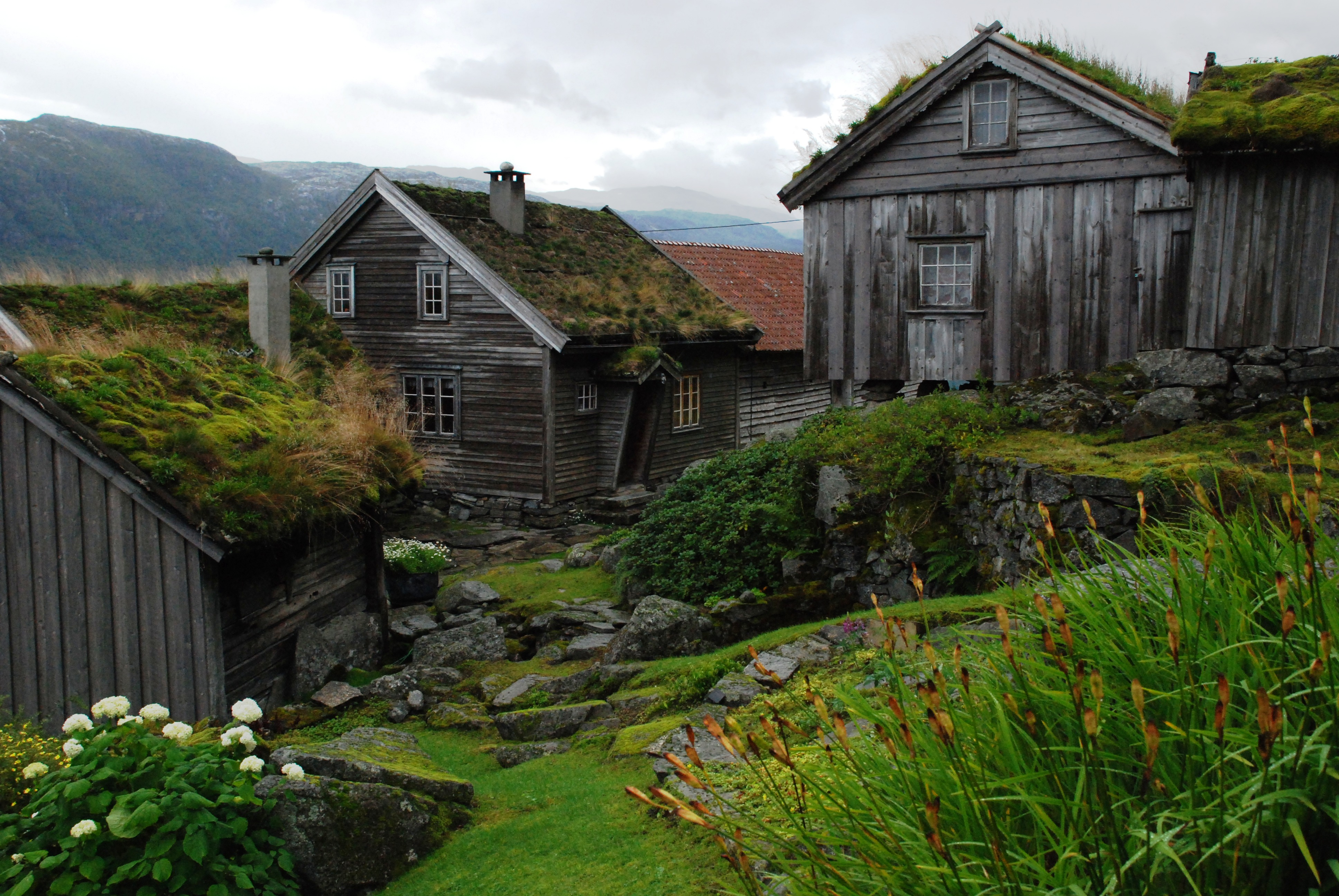 Garden Li i Suldal er eit særmerkt gardstun. Er ei av deling av Ryfylkemuseet